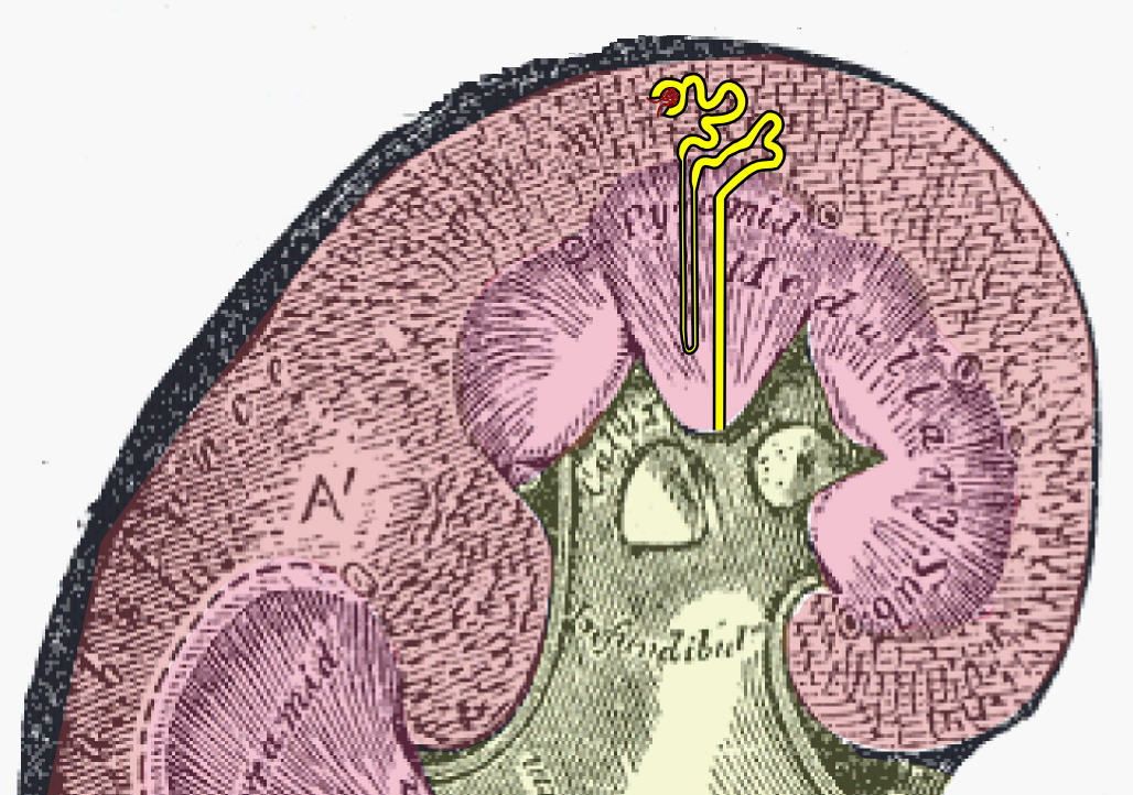 נפרון מוגדל בכליה